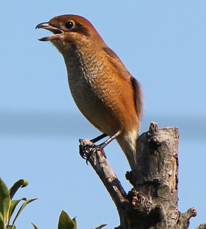 木の上で鳴くモズのメス